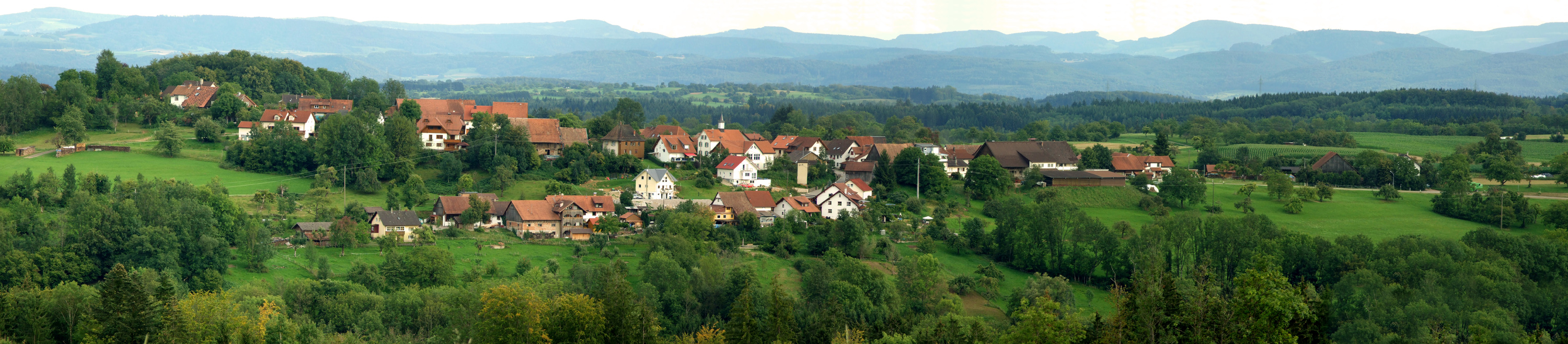 Kürnberg